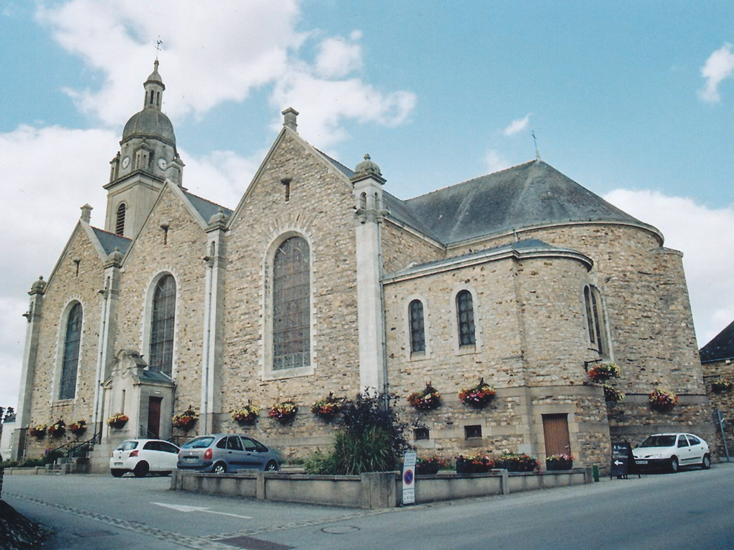 Vue d'ensemble de l'église Saint-Pierre et Saint-Paul de Derval